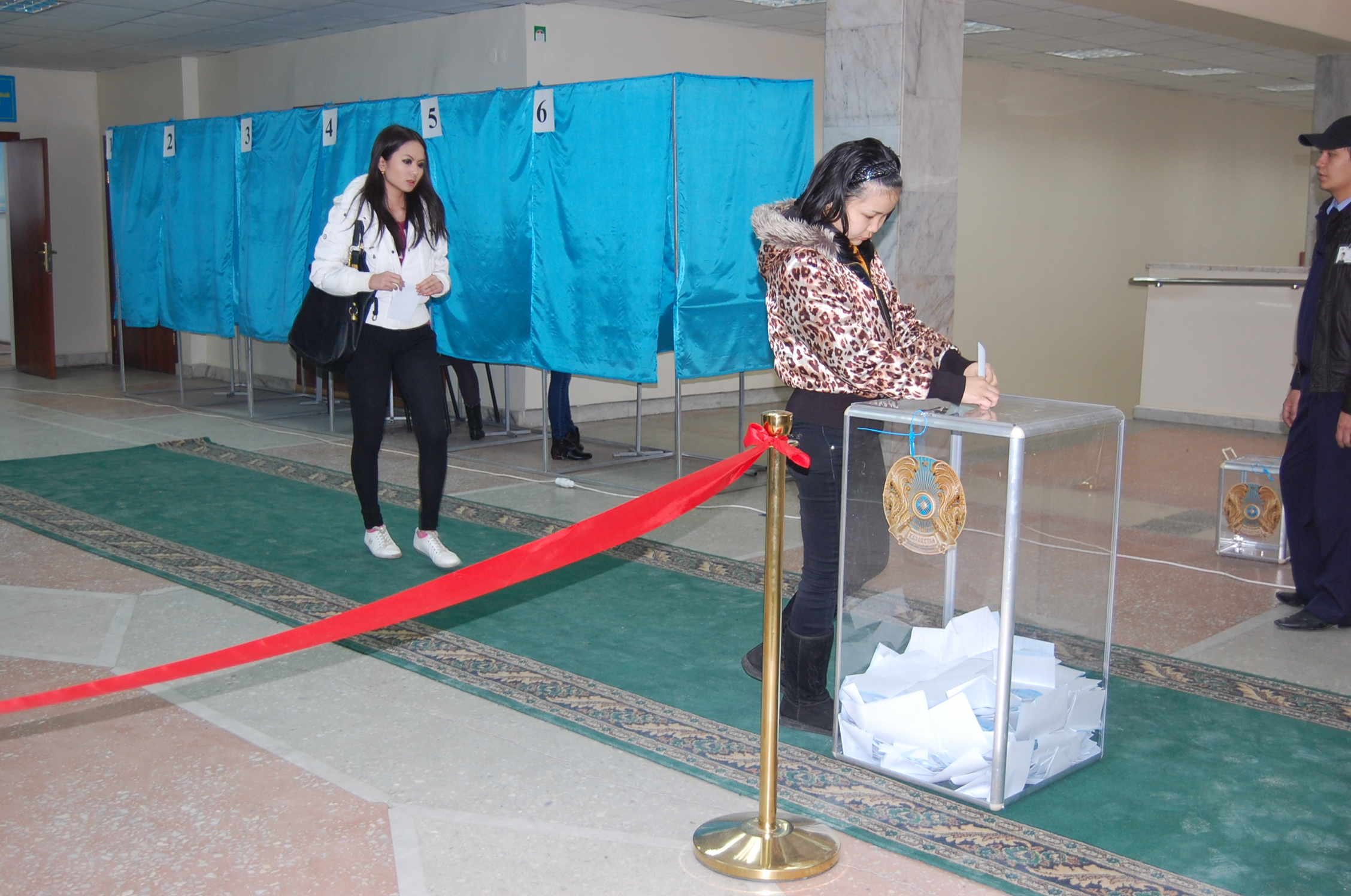 Голосование на избирательном участке №186 в Алма-Ате